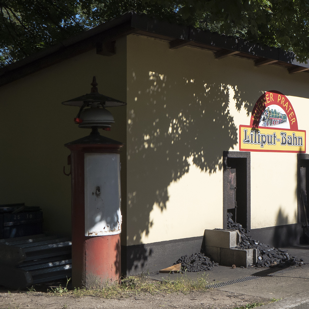 Liliputbahn im Wiener Prater in Wien 2, Läutewerk